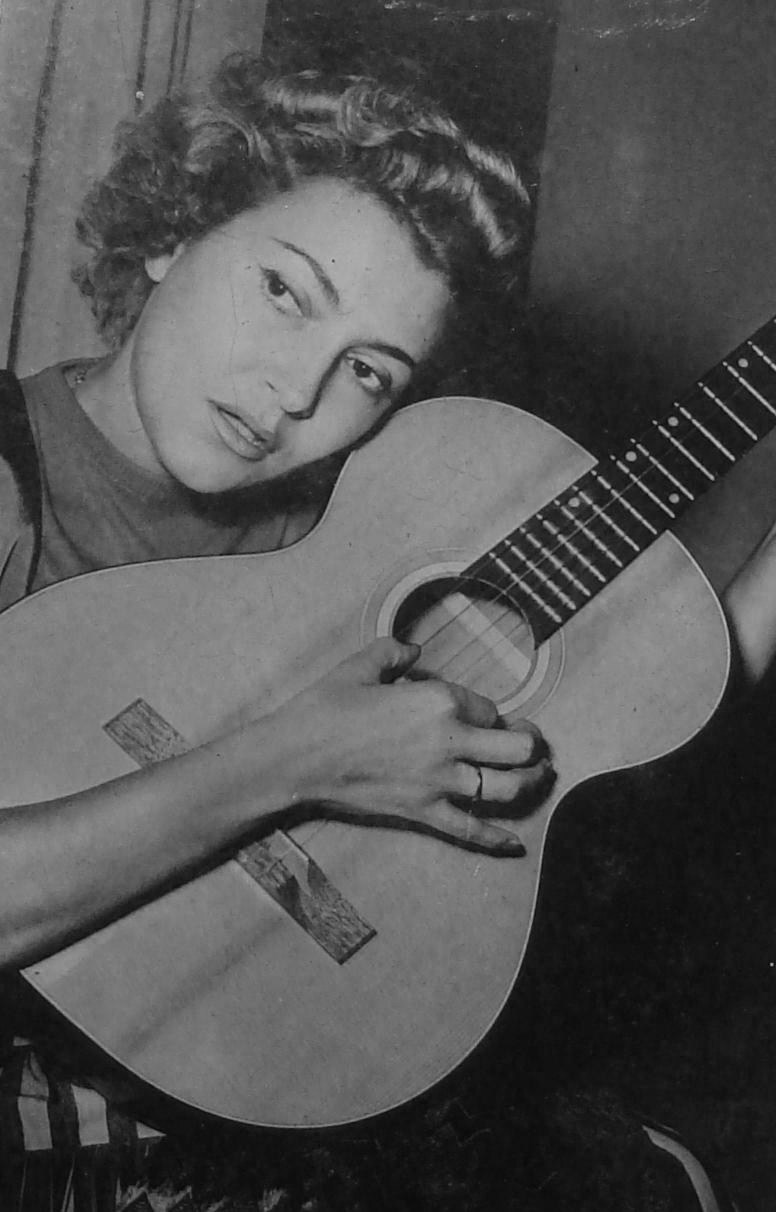 Nilla Pizzi. Sono il proprietario della foto